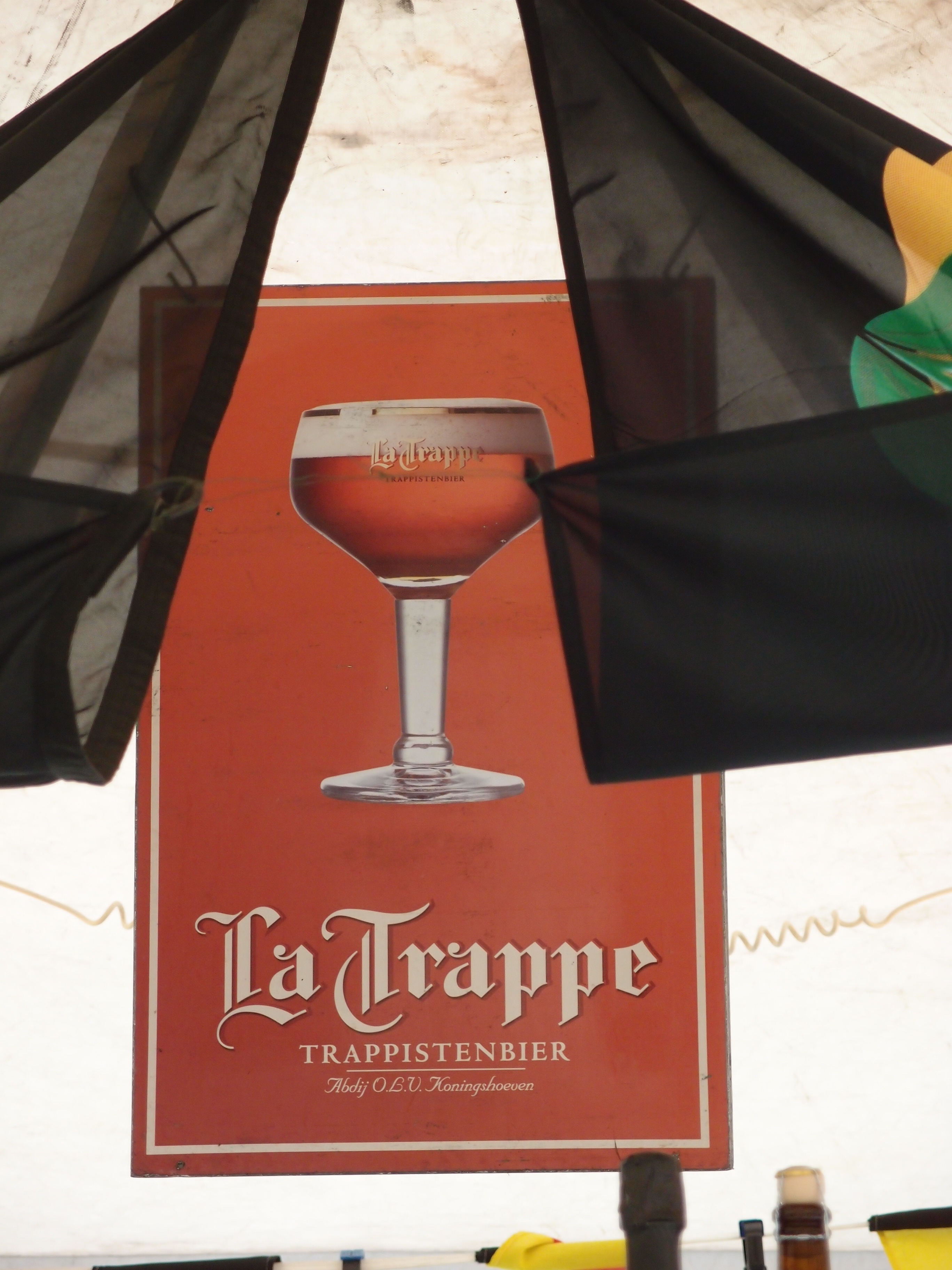 Bierbörse Bonn/2013 "La Trappe" Außenwerbung (Niederländisches Trappistenbier am belgischen Bierstand)